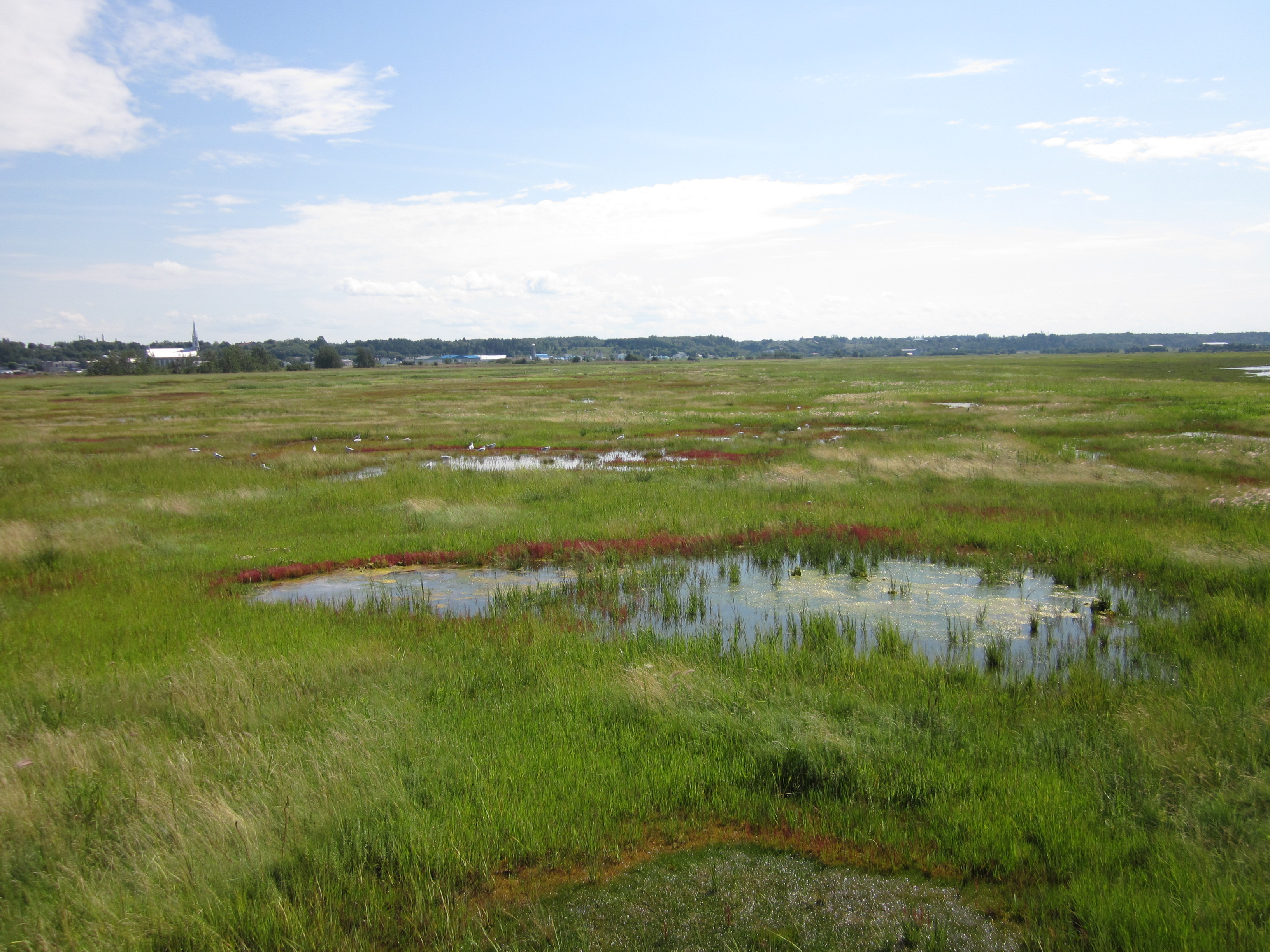 Marais de L'Isle-Verte avec la ville en arrière plan